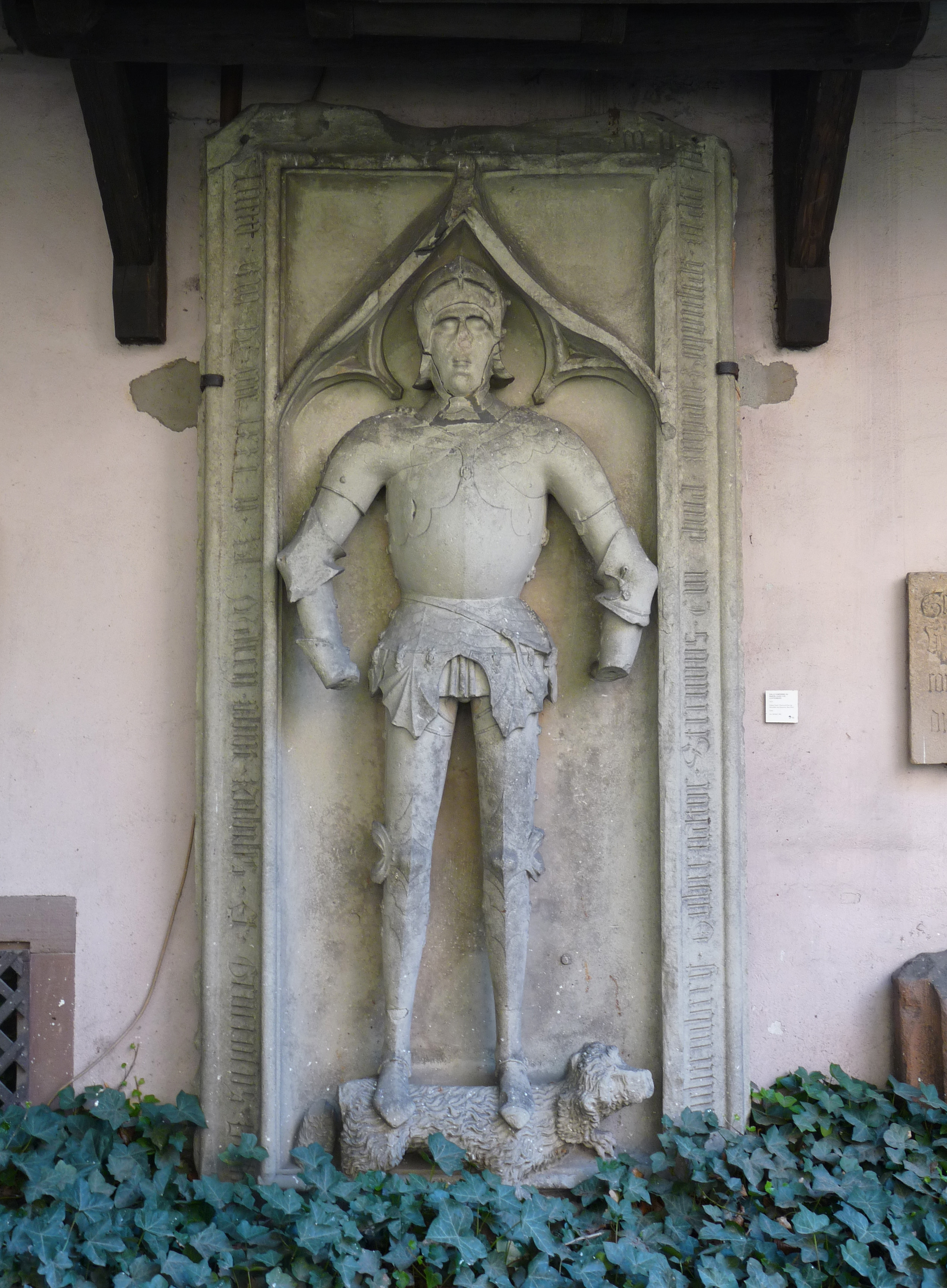 Dalle funéraire en grès (1471) du baron Louis V de Lichtenberg, dressée dans le jardin gothique du Musée de l'Oeuvre Notre-Dame (Strasbourg). En provenance de l'église Saint-Pierre-et-Paul de Neuwiller-lès-Saverne (Bas-Rhin